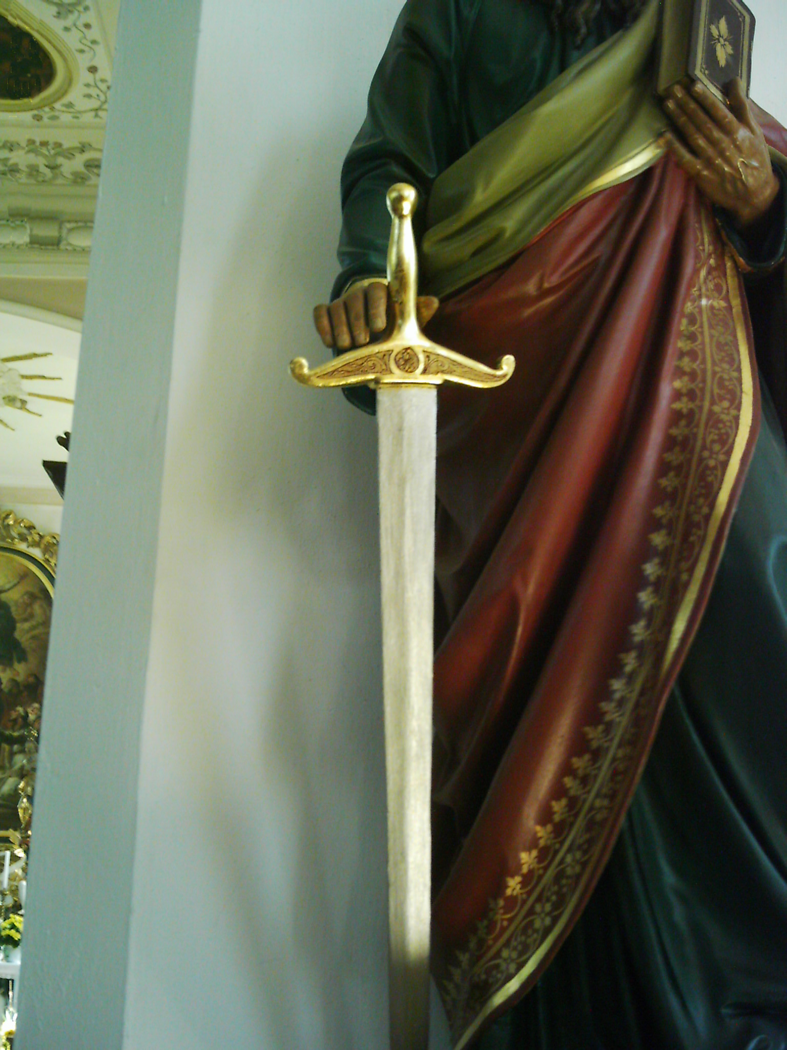 Detail Heiliger Paulus-Statue in der Kirche St. Petrus in Ketten, Haslach